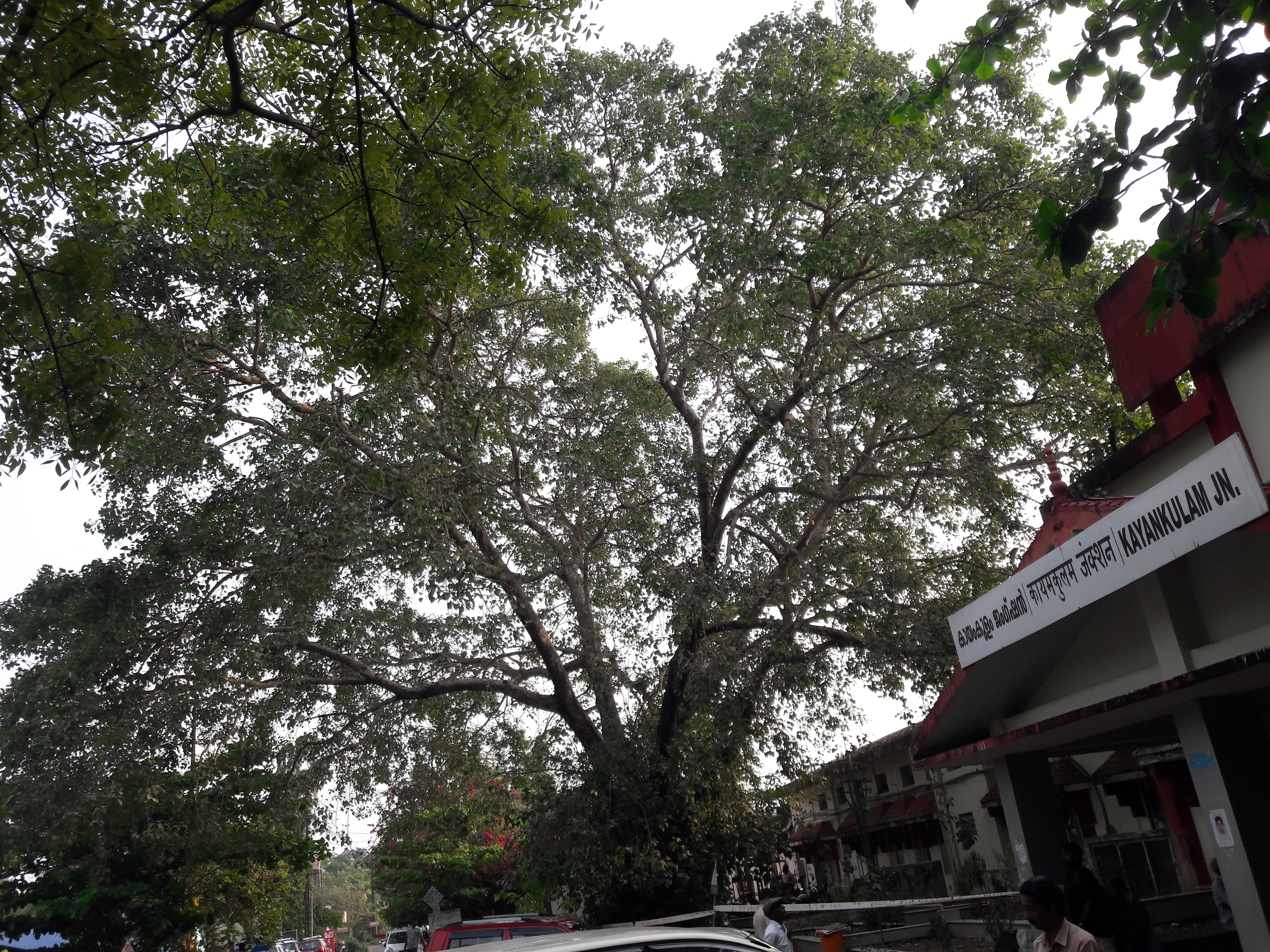 കായംകുളം ജങ്ക്ഷൻ തീവണ്ടി നിലയത്തിലെ അരയാല്‍ മരം.Peepal tree. ശാസ്ത്രീയ നാമം Ficus Religiosa കുടുംബം Moraceae.